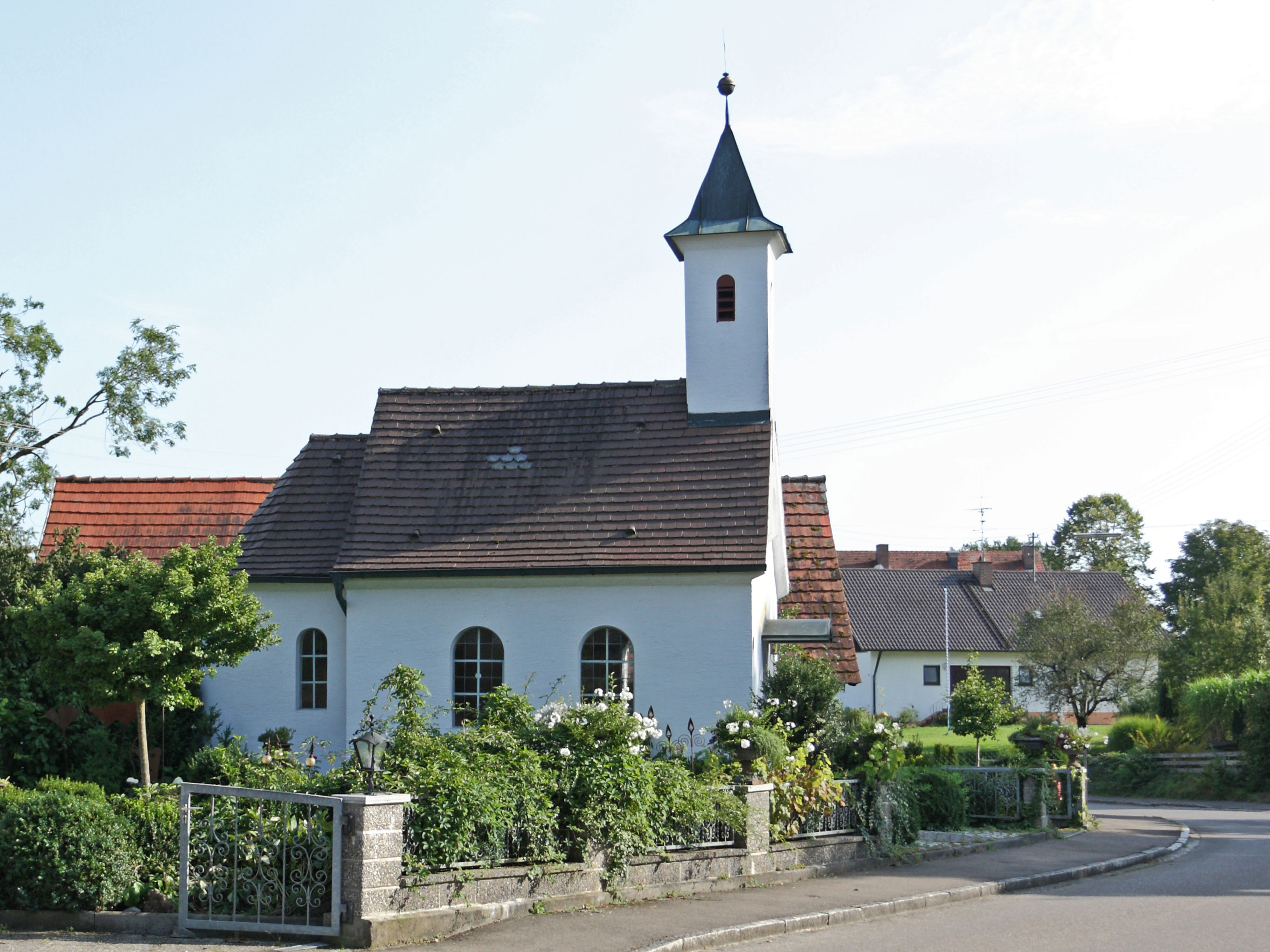 Kapelle Mariä Namen in Reifertsweiler (Kammeltal); Ansicht von Norden